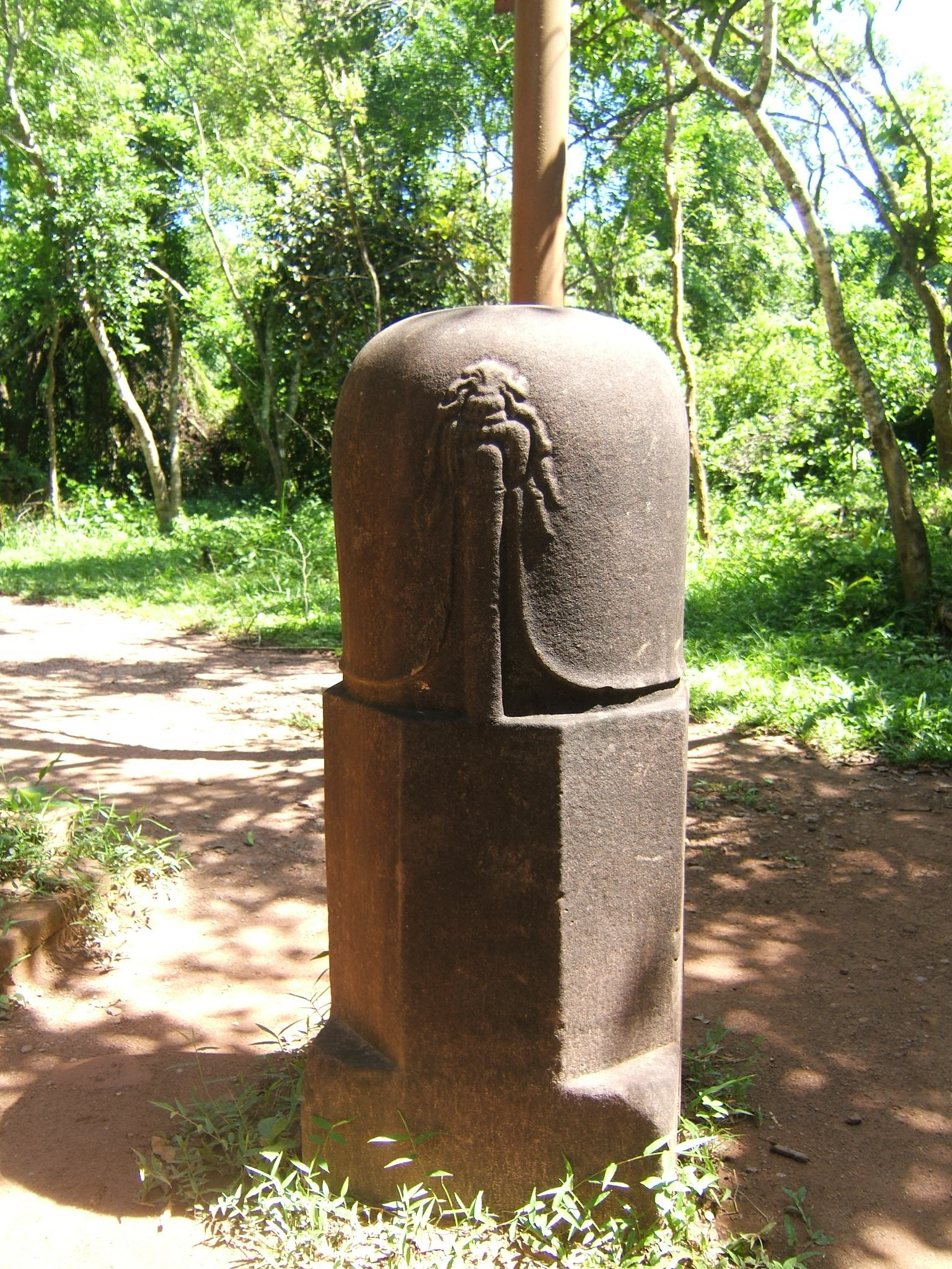 Linga 2 (My Son)